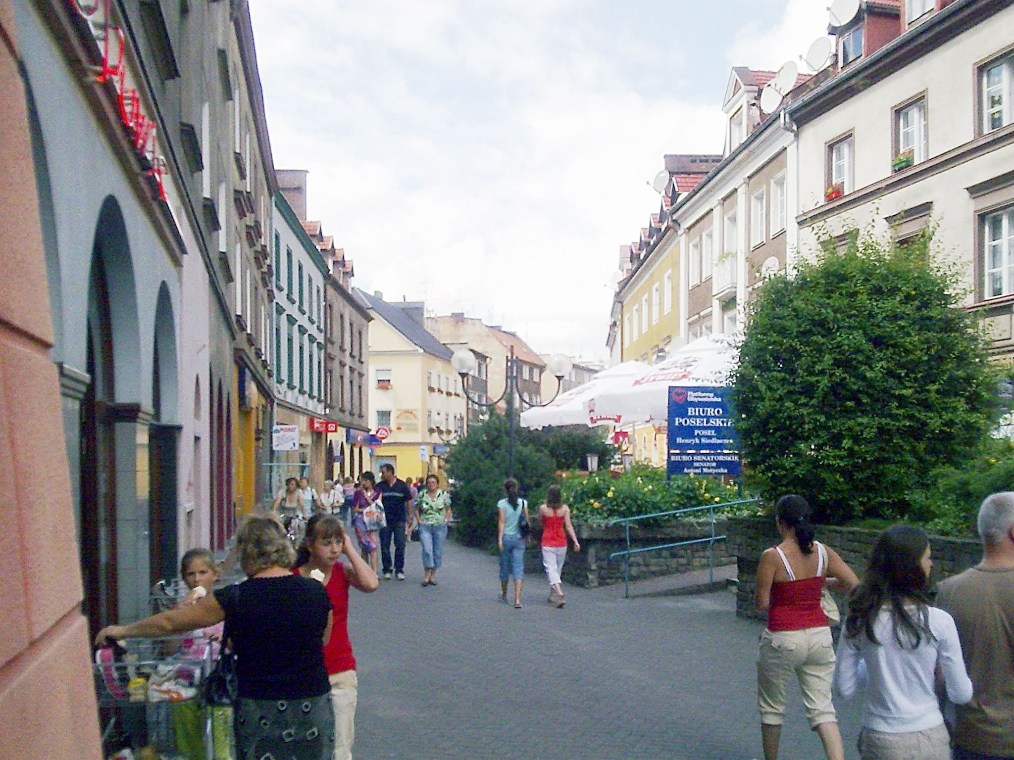 Ulica Długa w Raciborzu